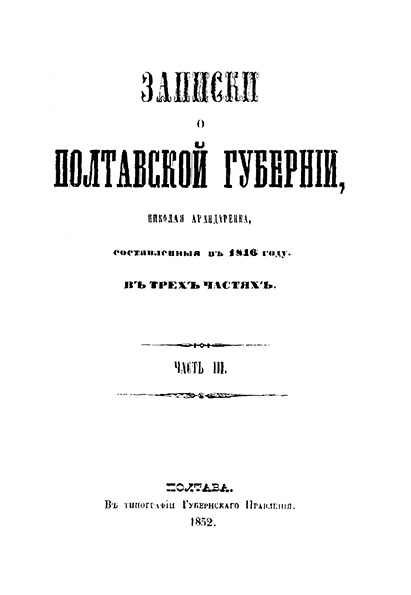 Николай Иванович Арандаренко (1795—1867). «Записки о Полтавской губернии» 1852 г.